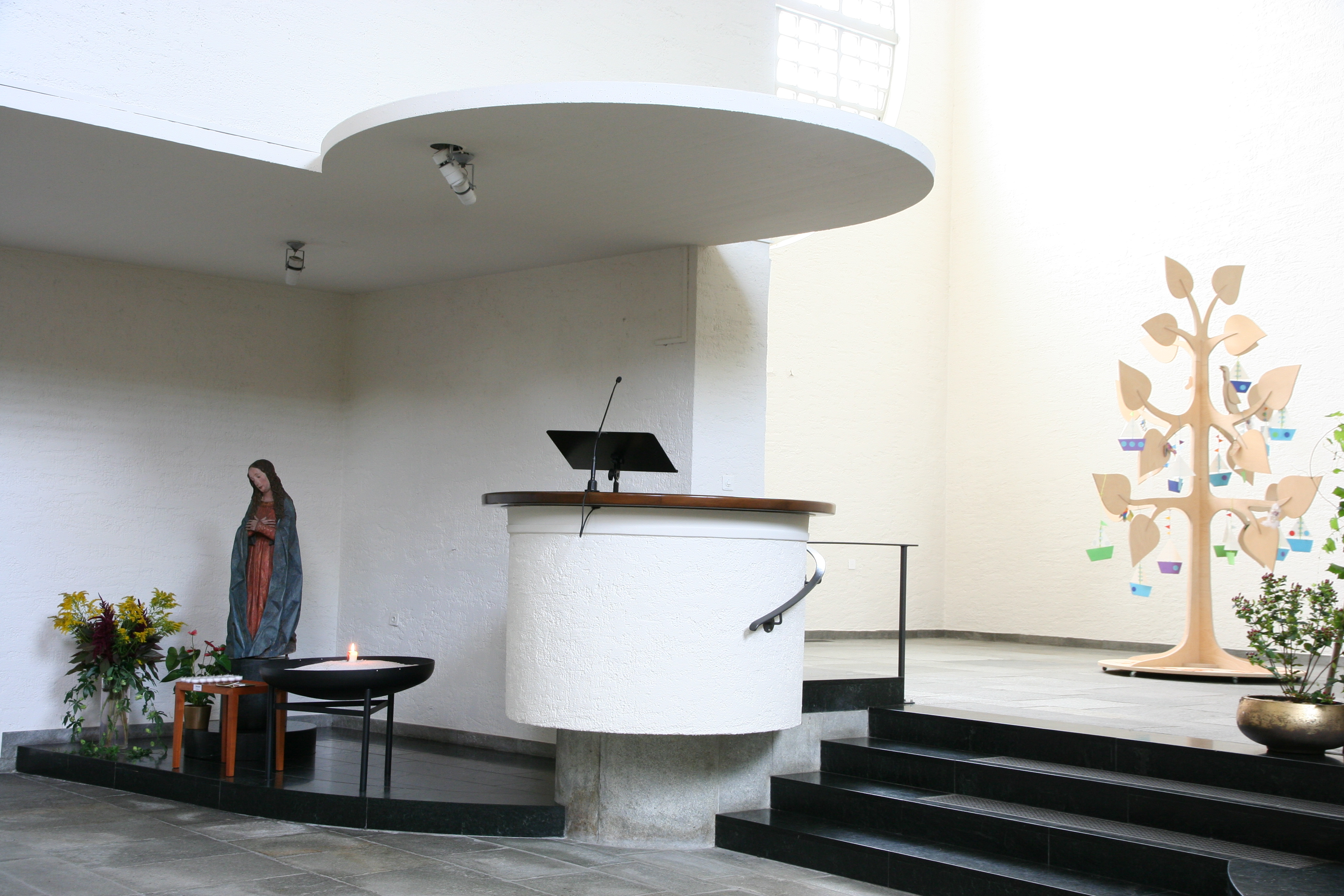 Römisch-katholische Pfarrkirche Maria Himmelfahrt Schönenwerd SO